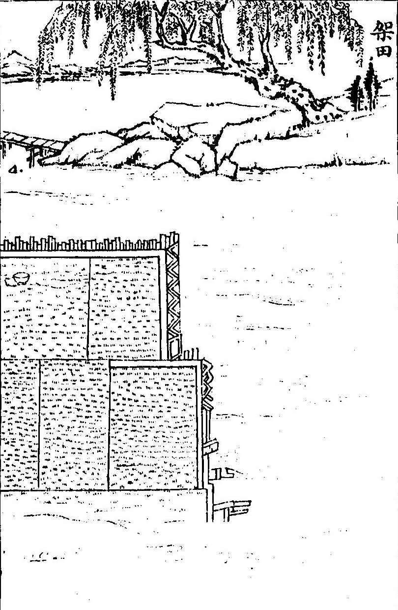 《農器圖譜》：架田